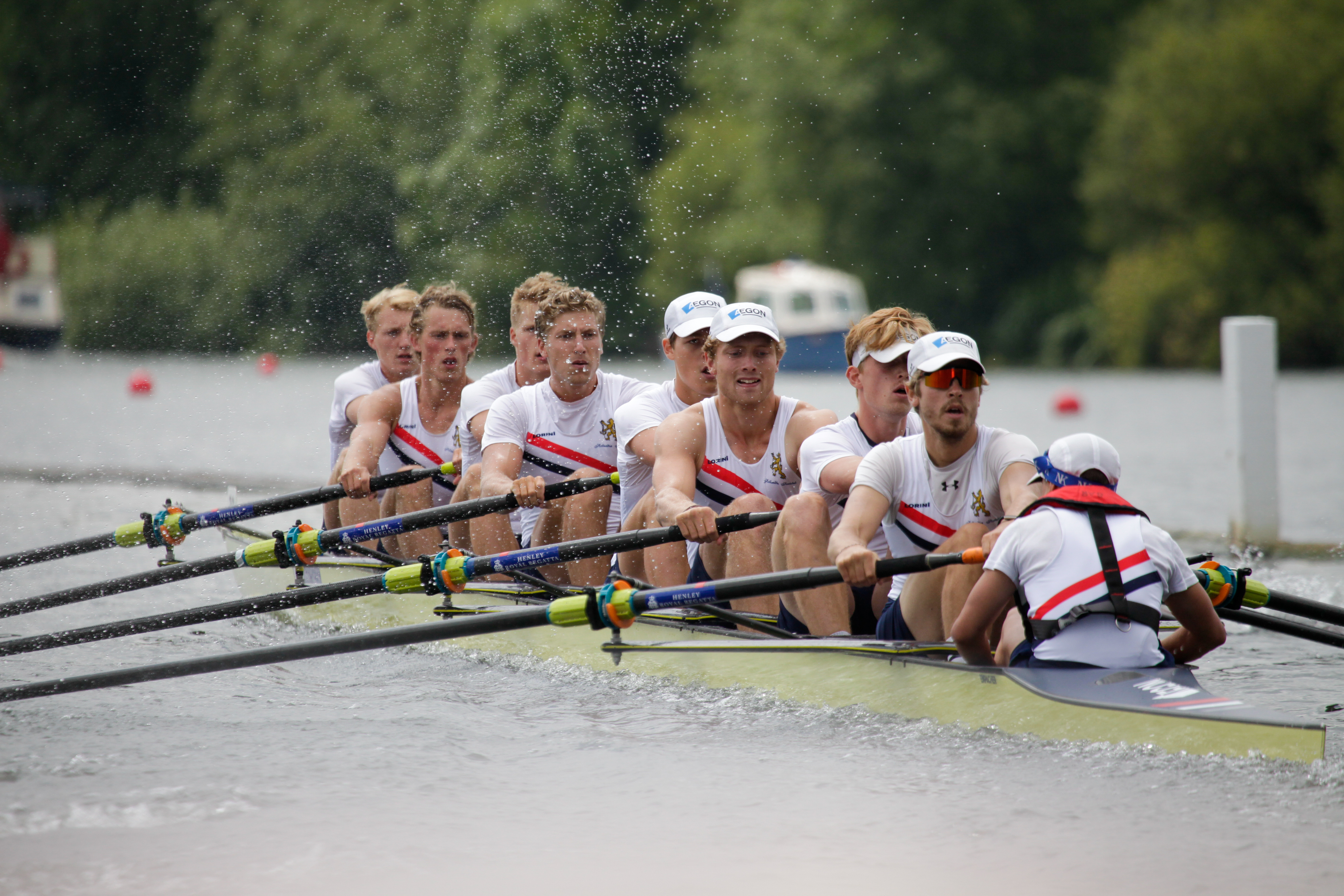 De Hollandia acht Theis Hagemeister (slag), Joris Moerman, Ties Talsma, Wibout Rustenburg, Olav Molenaar, Gert-Jan van Doorn, Daan Vos de Wael, Finn Florijn en Bjørn Kwee (stuurman) roeiteen Ladies' Challenge Plate baanrecord in Henley (2019)